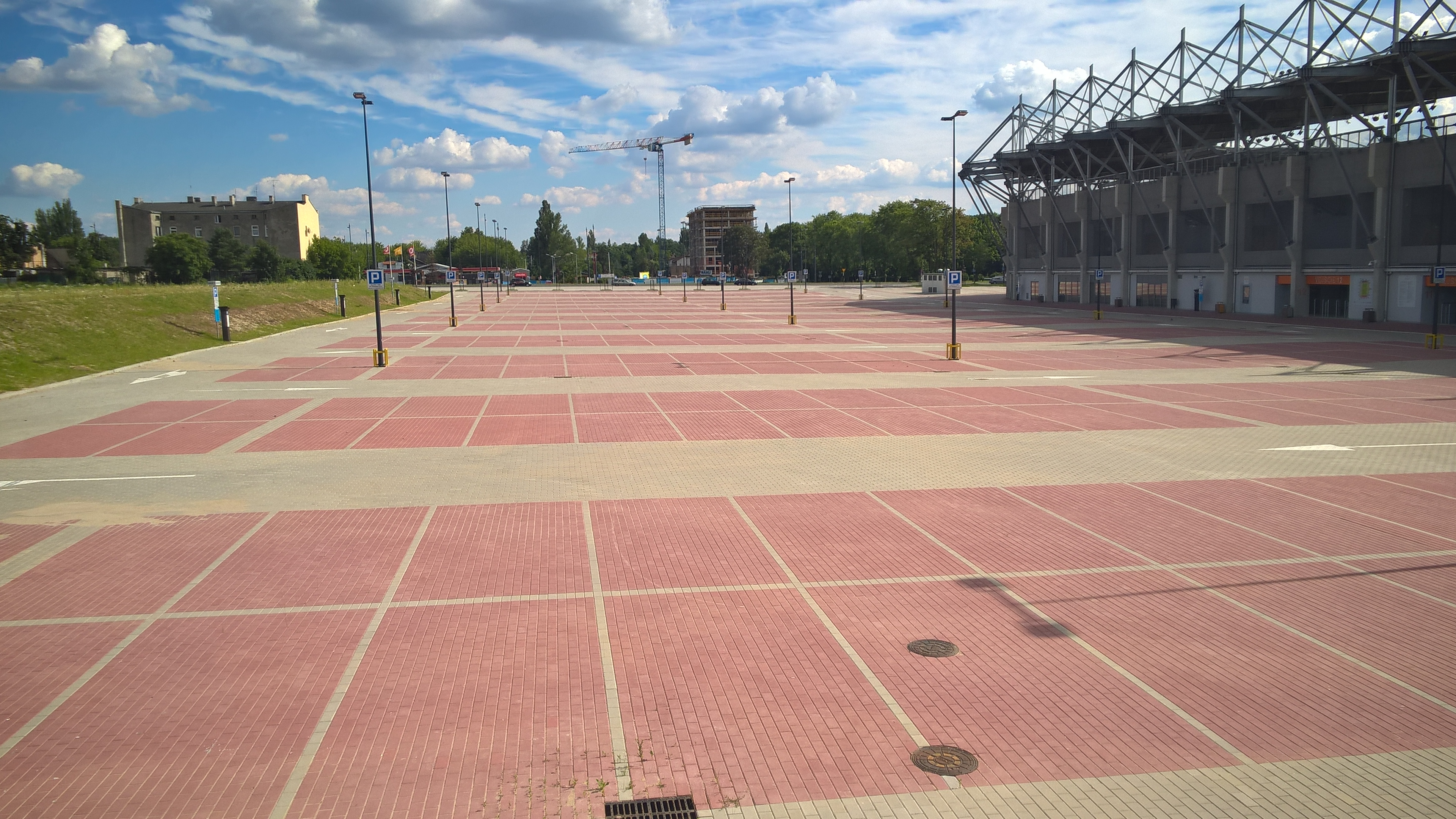 Nowy stadion Widzewa – parking obok trybuny "C" (lipiec 2017)